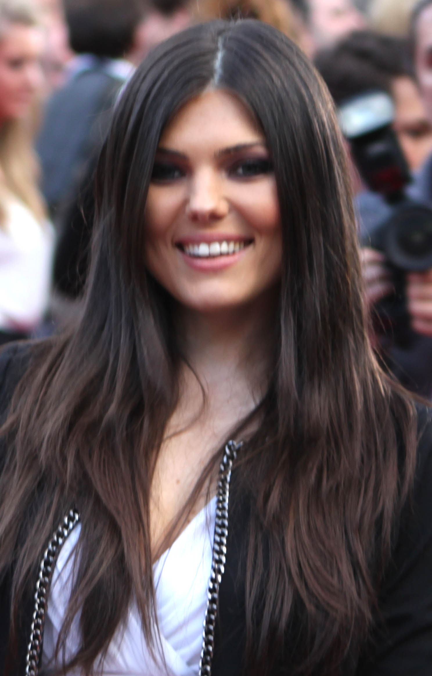 Foto: Vincent Hasselgård, Aktiv I Oslo.no